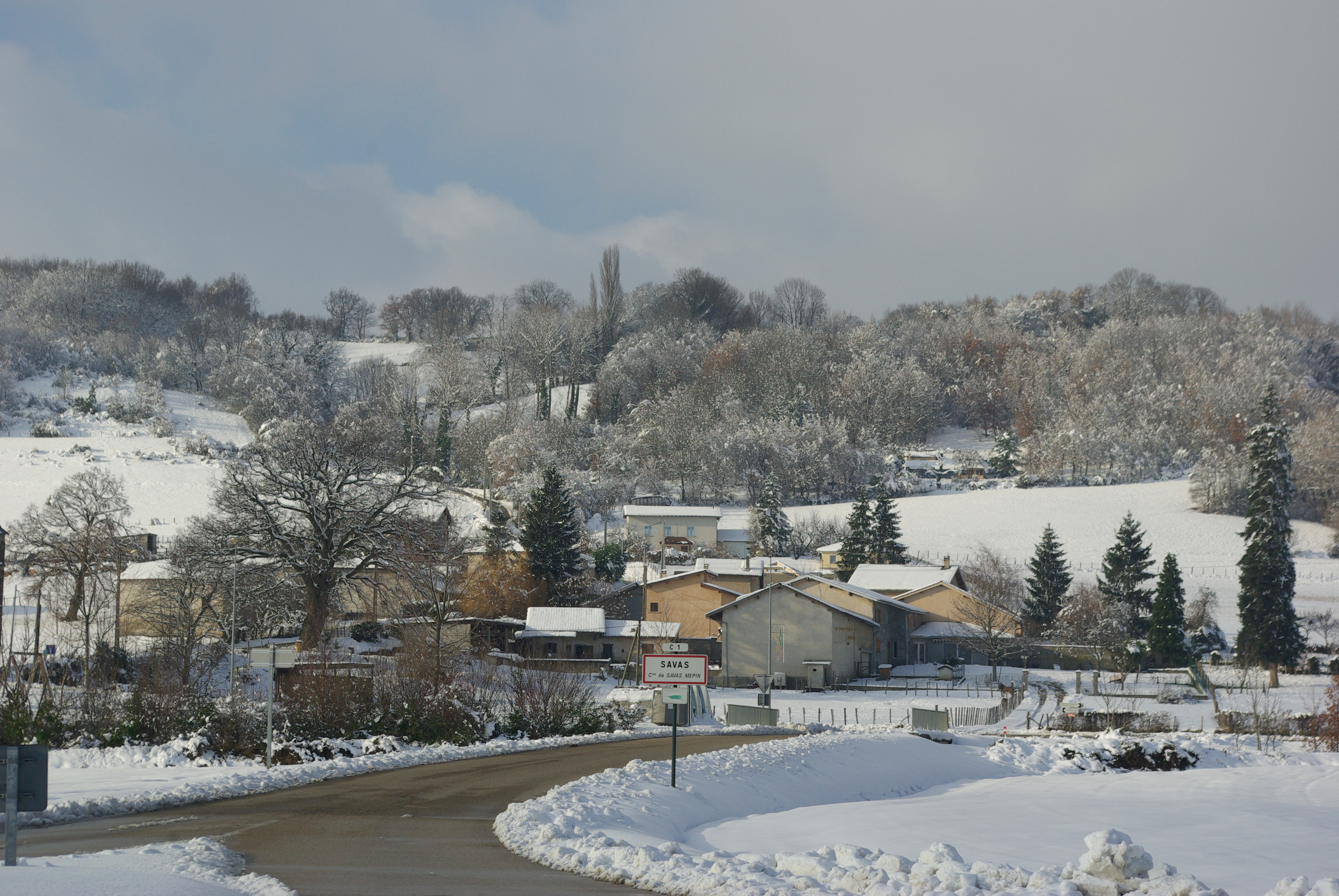 vue de Savas sous la neige